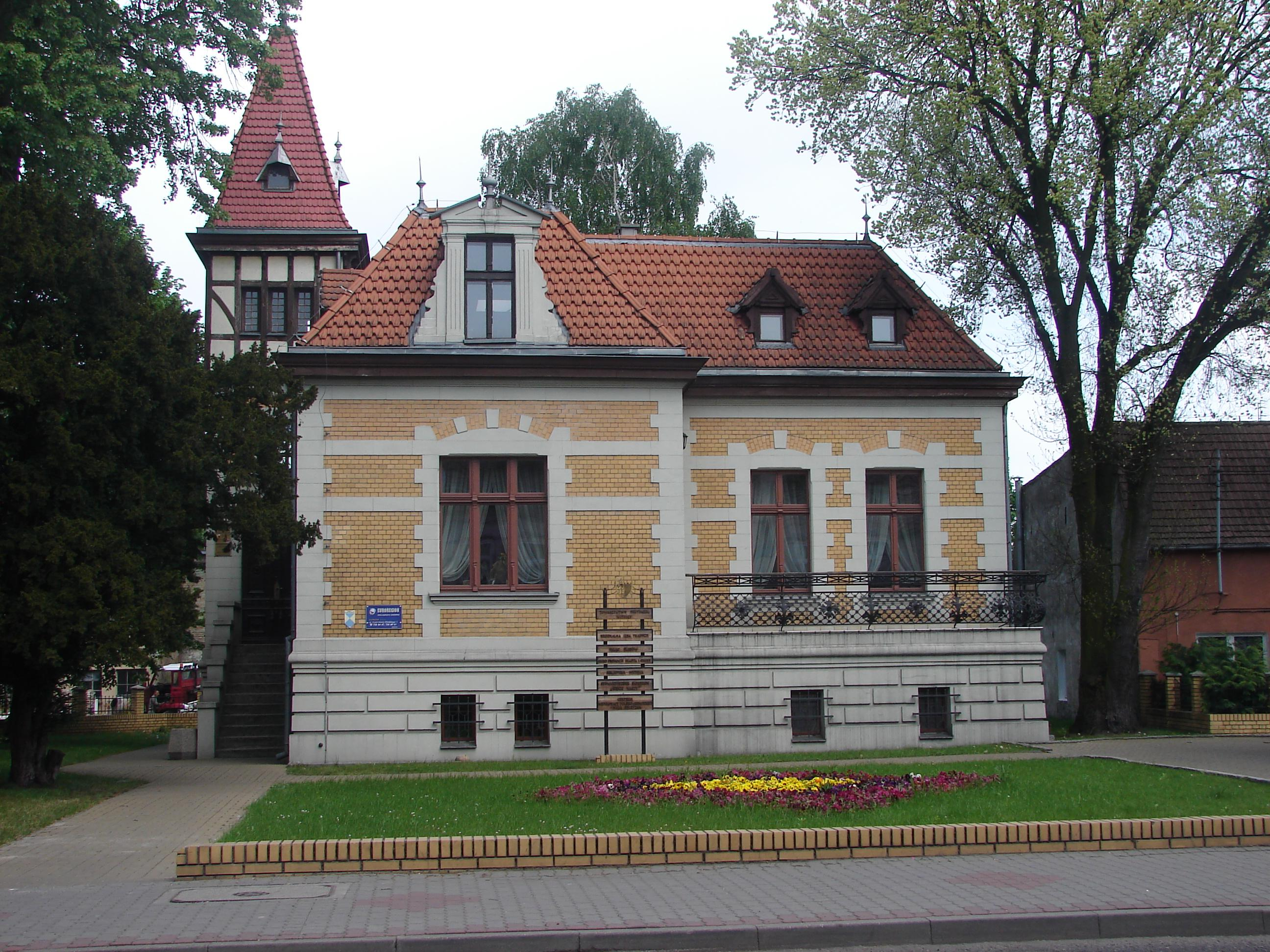 Witnica, ul. Sikorskiego 6 - Regionalna Izba Tradycji - "Żółty Pałacyk"